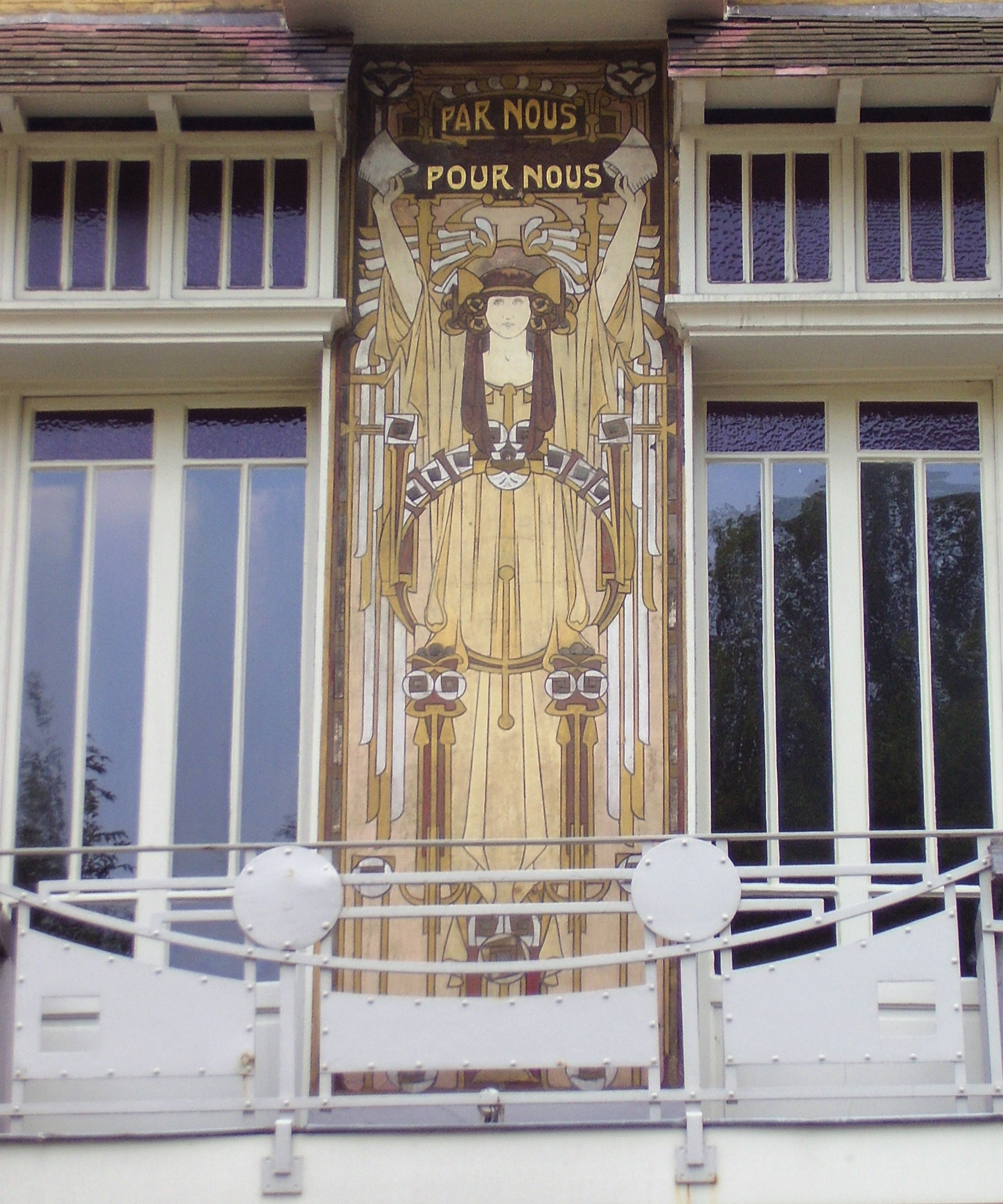 Description: Maison Cauchie, architecte Paul Cauchie, 1905 - Etterbeek (Bruxelles) détail 1er étage Par nous, pour nous Author: User:Ben2 Date of creation: 30 juin 2006 Source: Photo personnelle